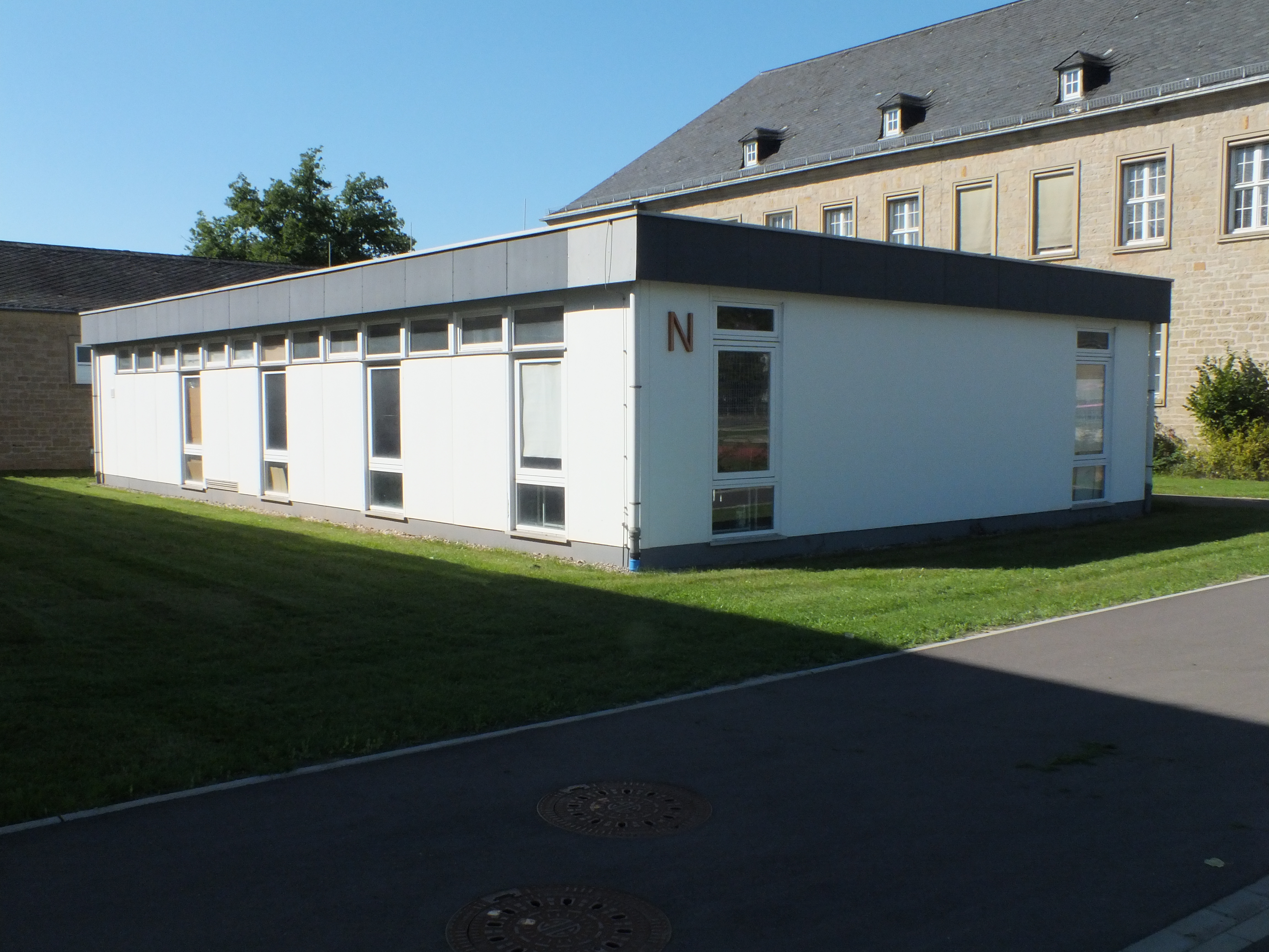 Hochschule Trier, Hauptcampus (Standort Schneidershof) - Gebäude N (eigentlich provisorisch und auf keinem Plan verzeichnet, aber ca 50 Jahre alt und 2014 neu renoviert)